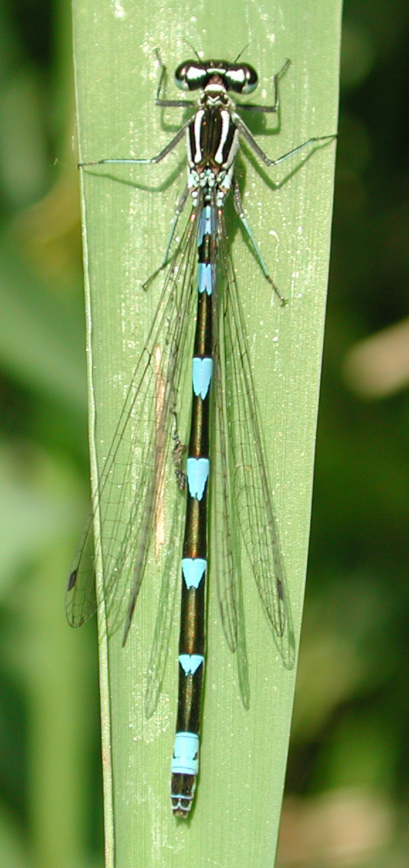 Coenagrion pulchellum, f., normal blue coloring, NSG Kirchwerder Wiesen, Elbmarsch bei Hamburg, Germany